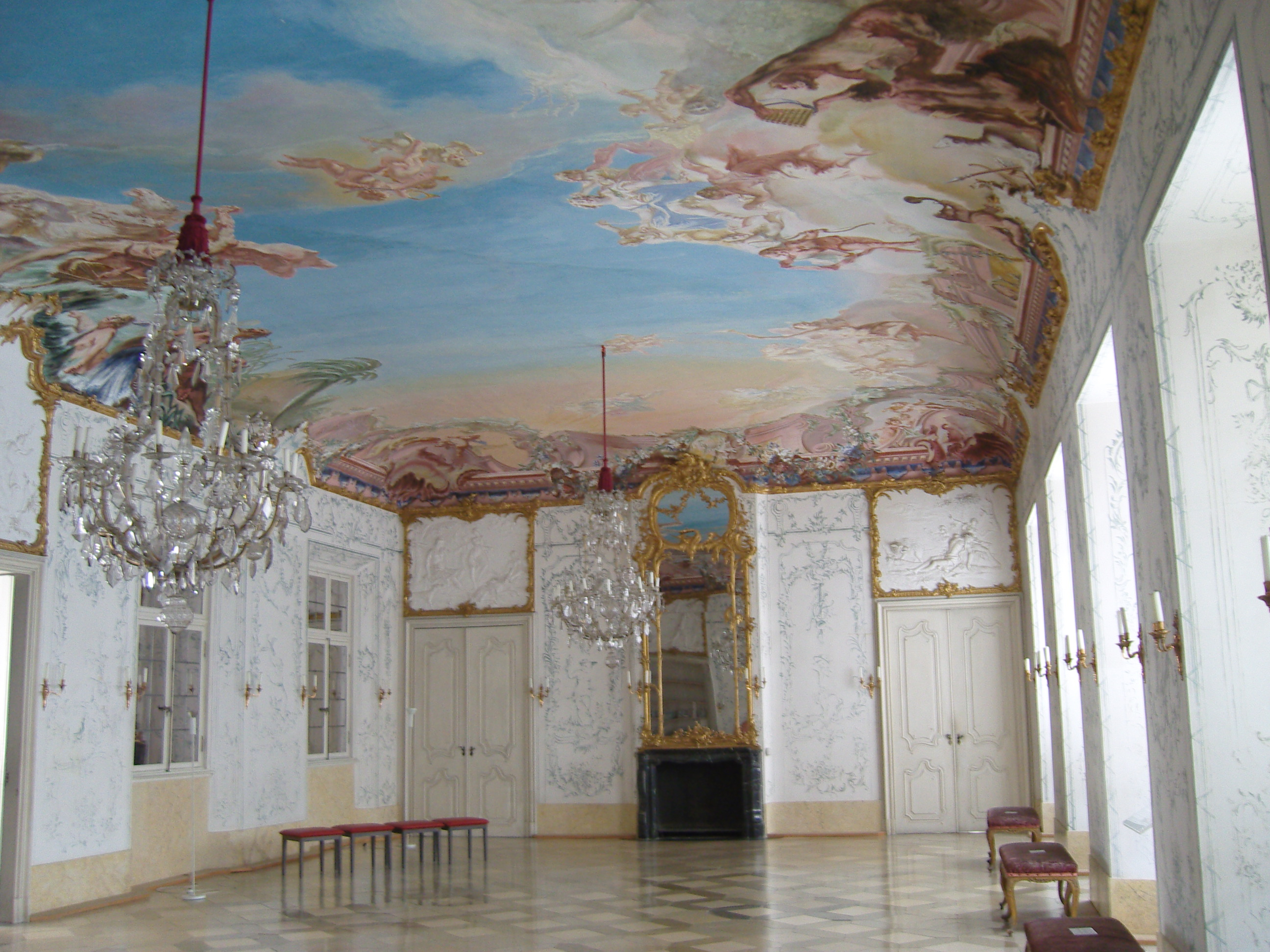 Denkmalgeschütztes Schloss Seehof in Memmelsdorf; PrunkraumThis is a photograph of an architectural monument.